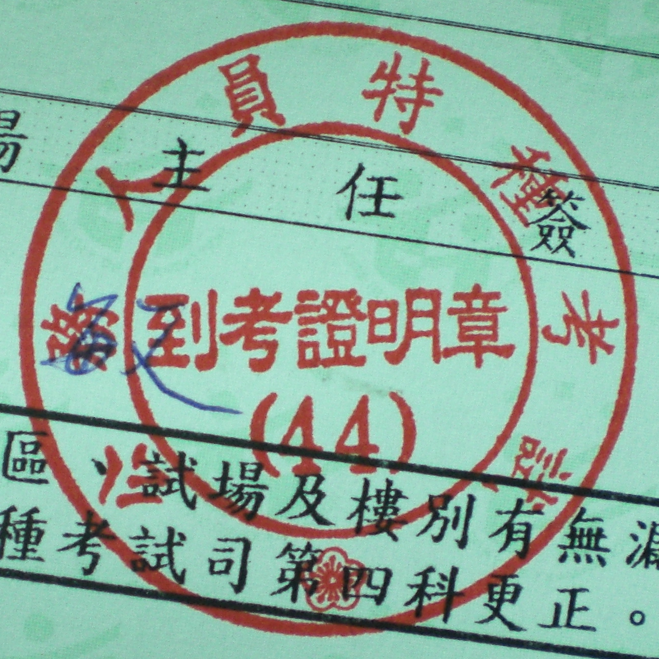 中文（台灣）: 中華民國101年特種考試地方政府公務人員考試到考證明章